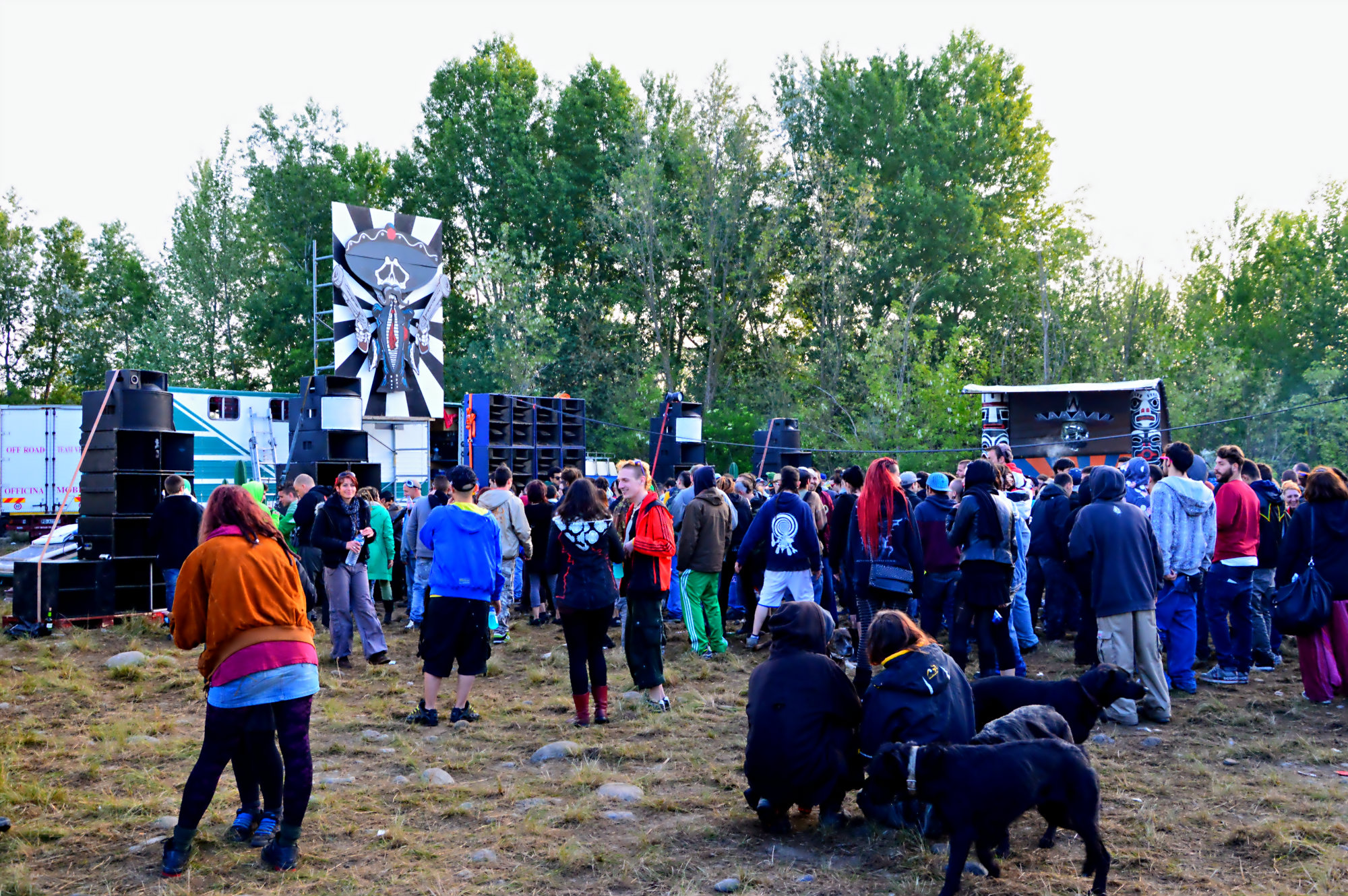 free party in italia